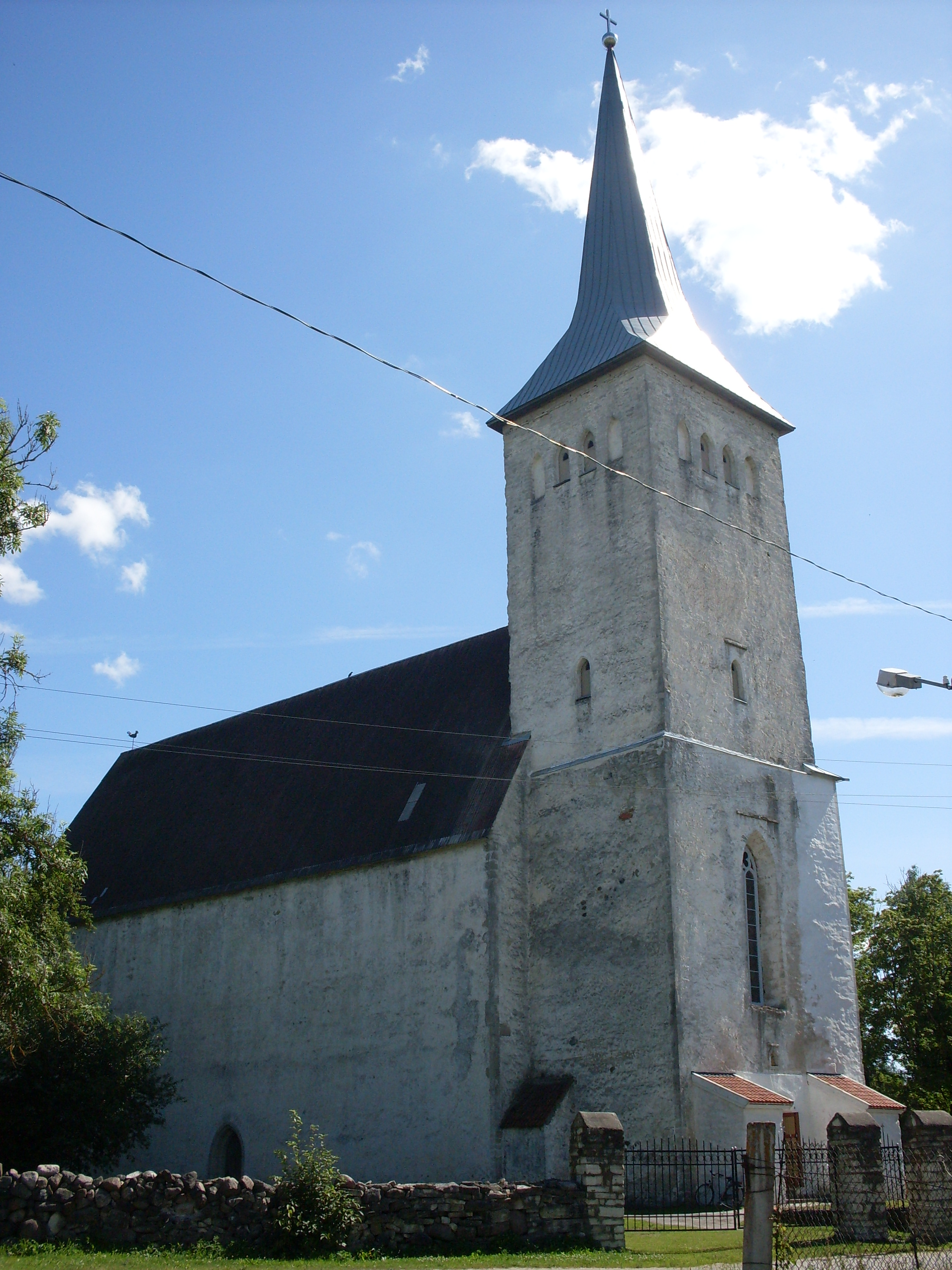 Märjamaa kirik